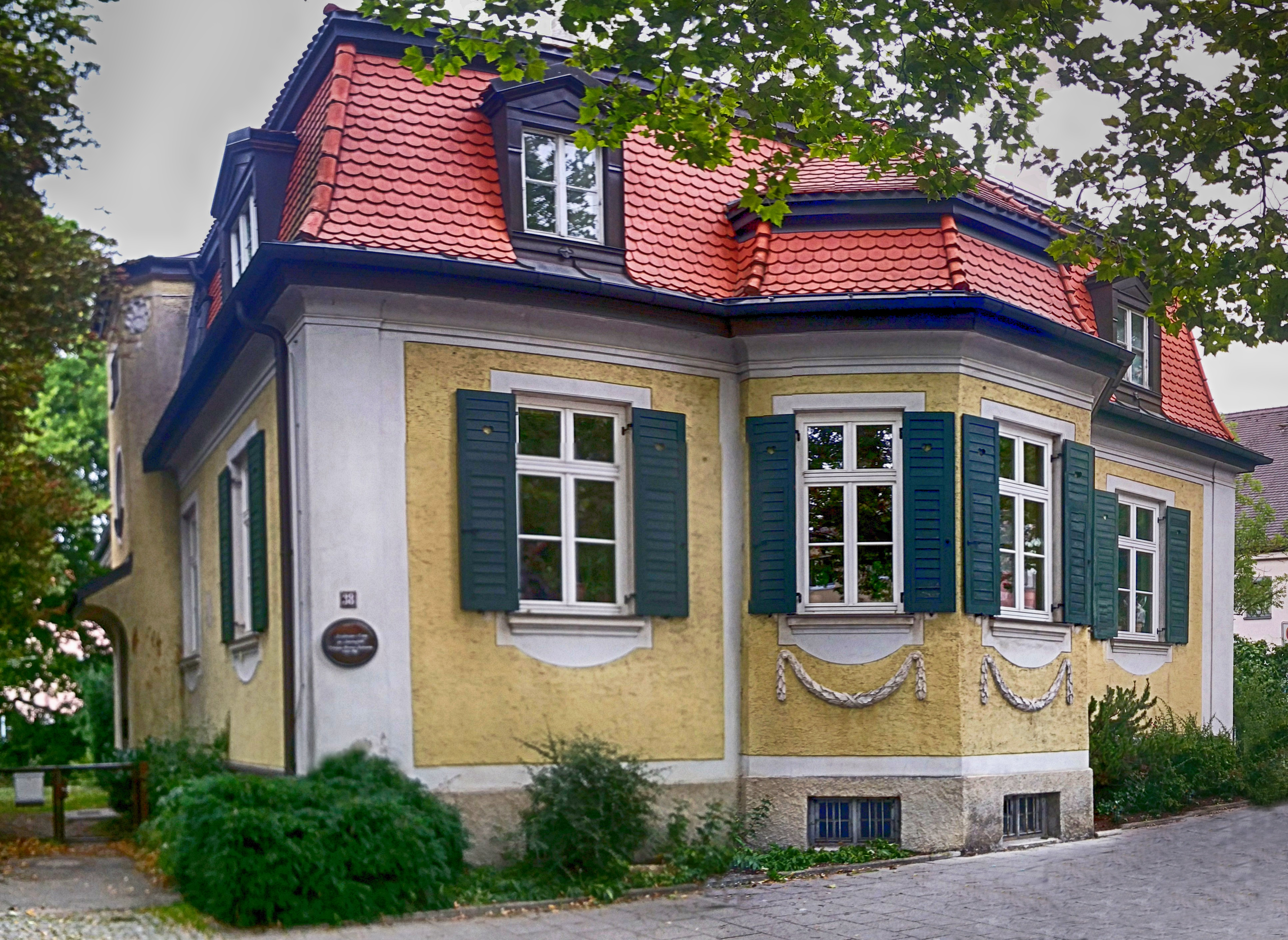 Deutschland, Bayern, Oberbayern, Landkreis Dachau, Ort Dachau, das 1899 erbaute "Stockmann-Haus", Wohnhaus des Malers Hermann Stockmann, genannt das "Spatzenschlößl"